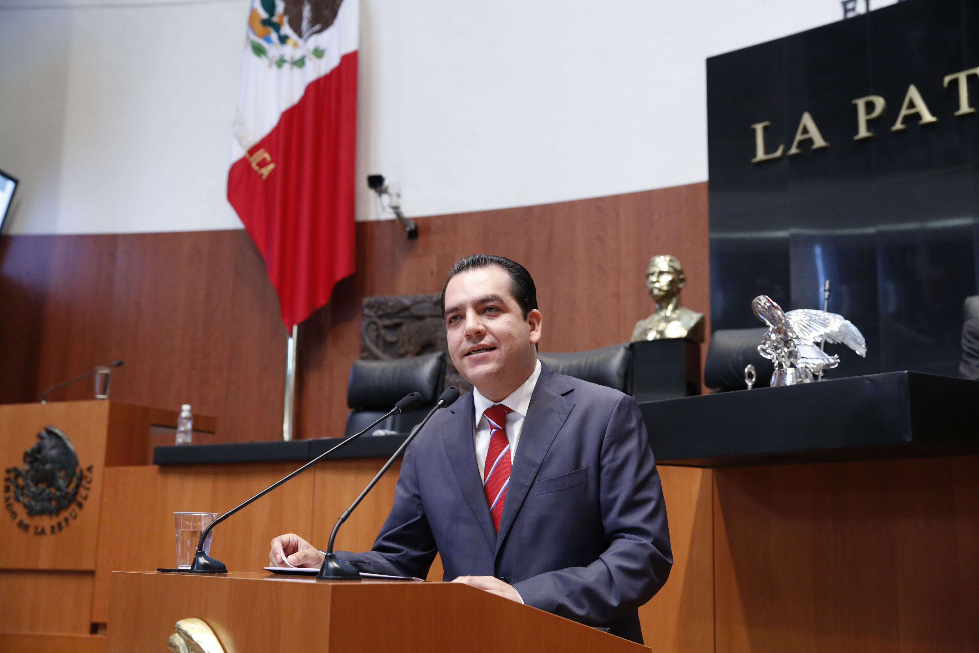 Roberto Albores Gleason, político chiapaneco.